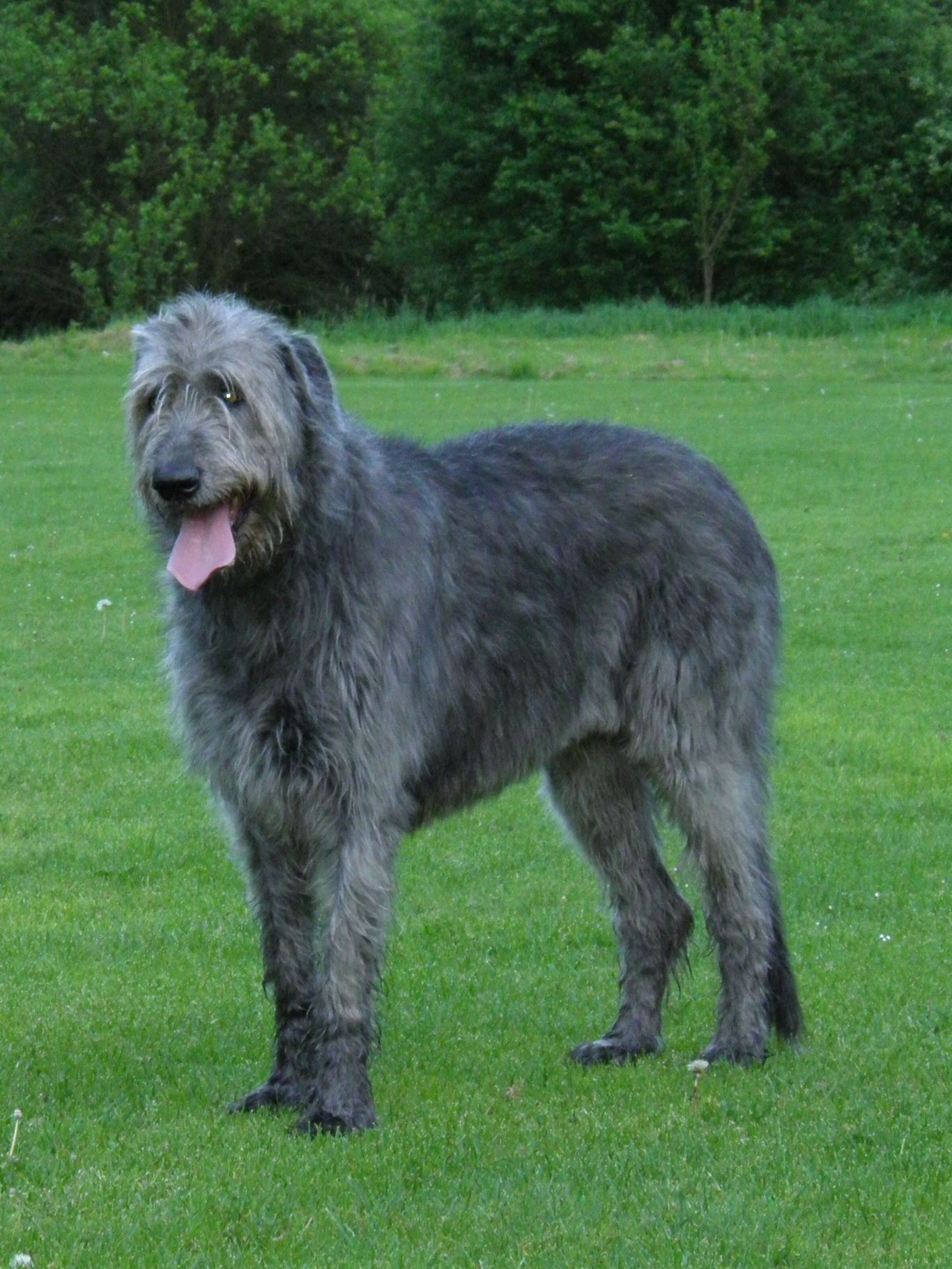 Fena iského vlkodava